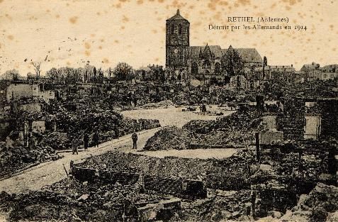 Rethel détruit par les Allemands.